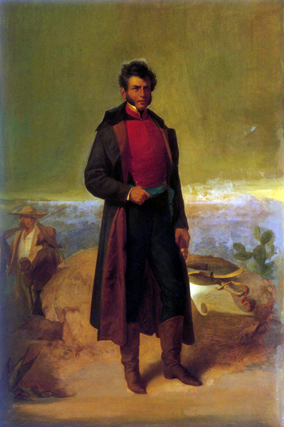 Ramón Sagredo, Vicente Guerrero. Imagen tomada del libro: Eduardo Báez, La pintura militar de México en el siglo XIX, México, SDN, 1992, p. 46.